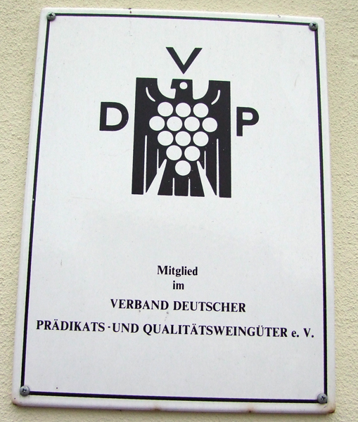 Mitglied im Verband Deutscher Prädikats- und Qualitätsweingüter e.V., Schild am Hause Weingut Gunderloch in Nackenheim